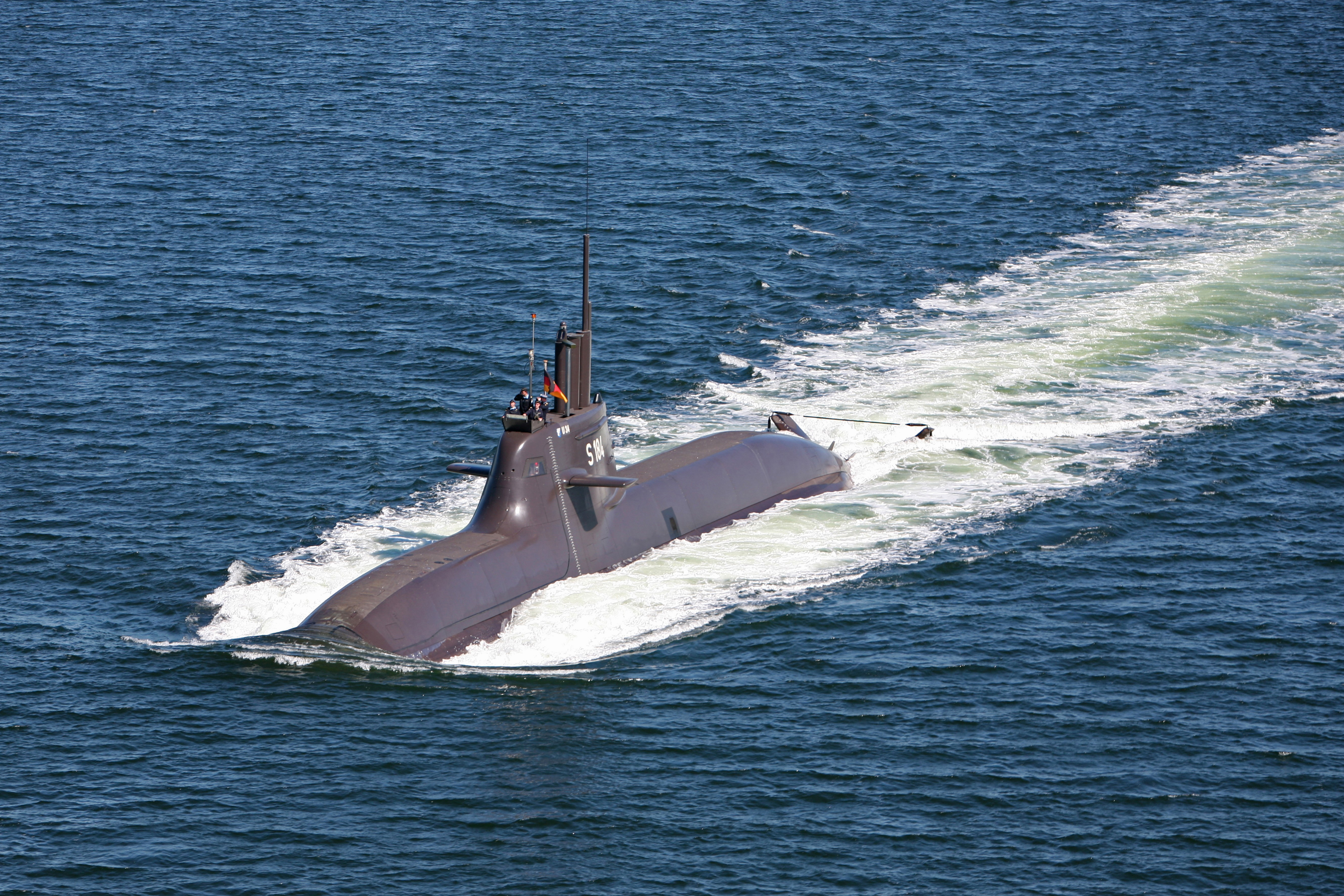 Luftbild vom U-Boot (U 34) der Klasse 212A in Fahrt . ©Bundeswehr/B.Wilke